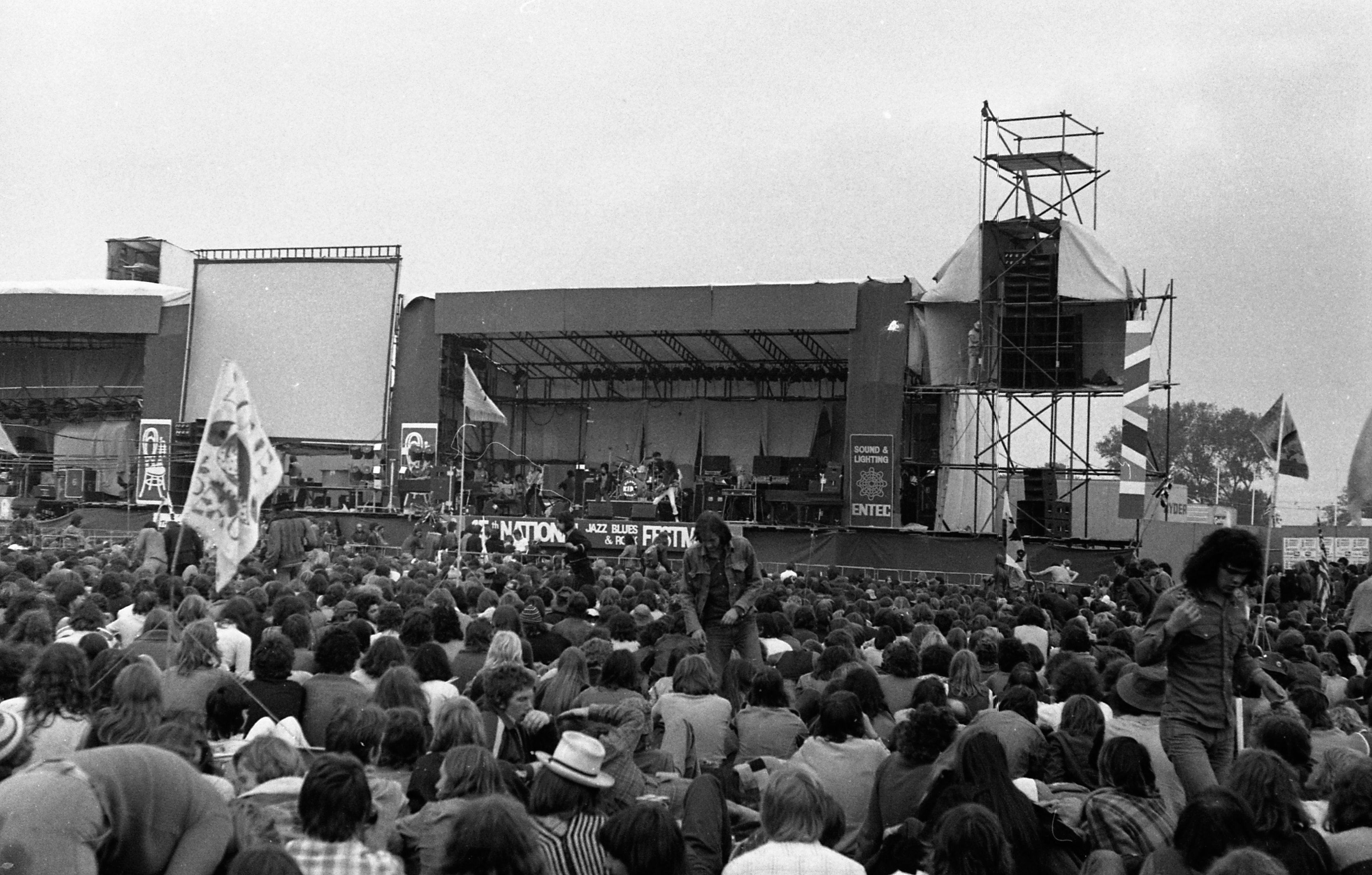 Image1-6.jpg